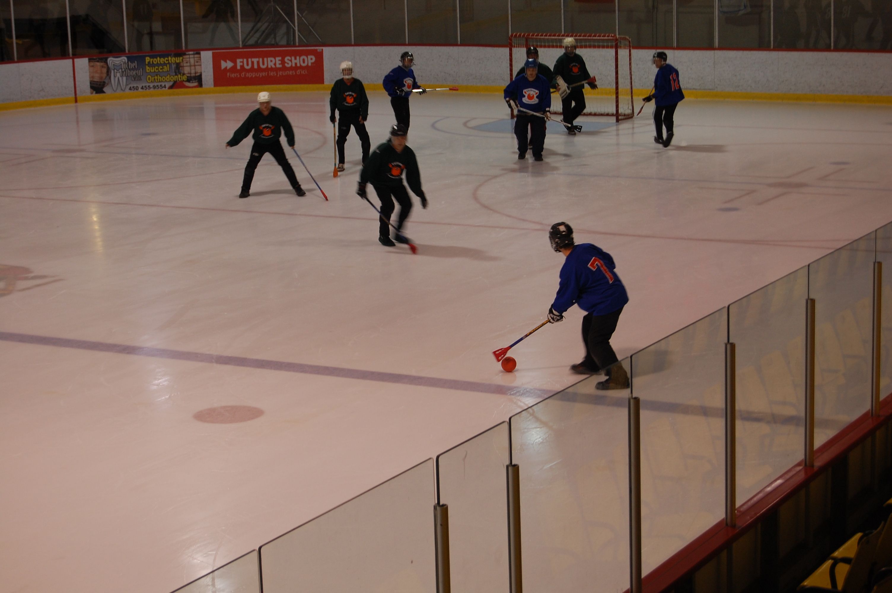 ballon sur glace